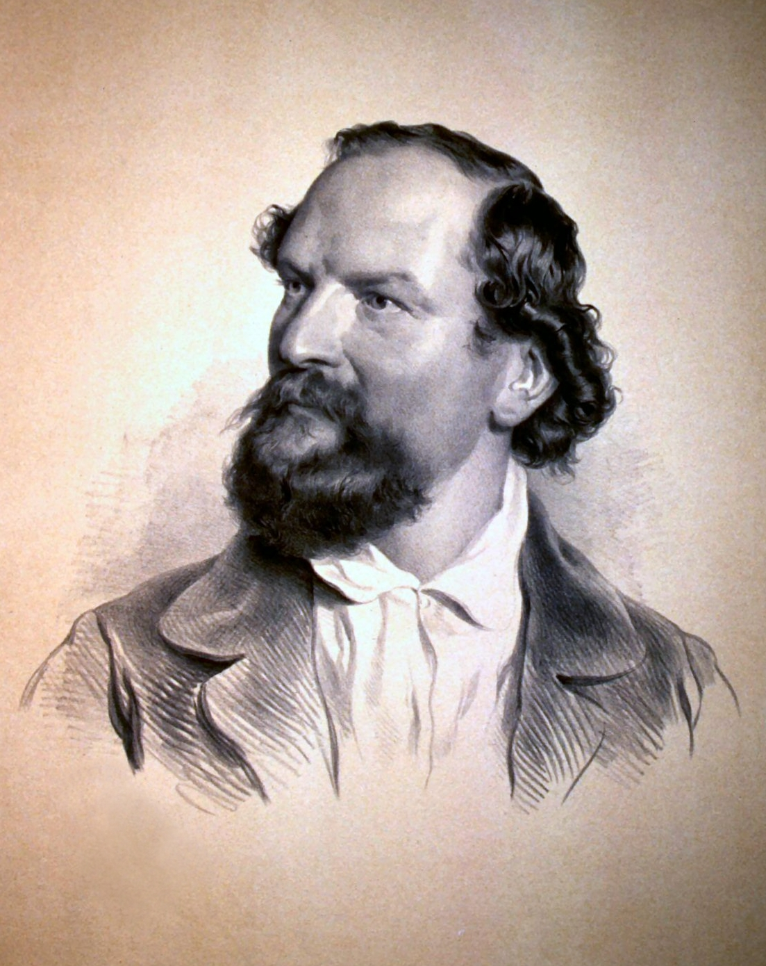 aus den großen Studien nach der Natur